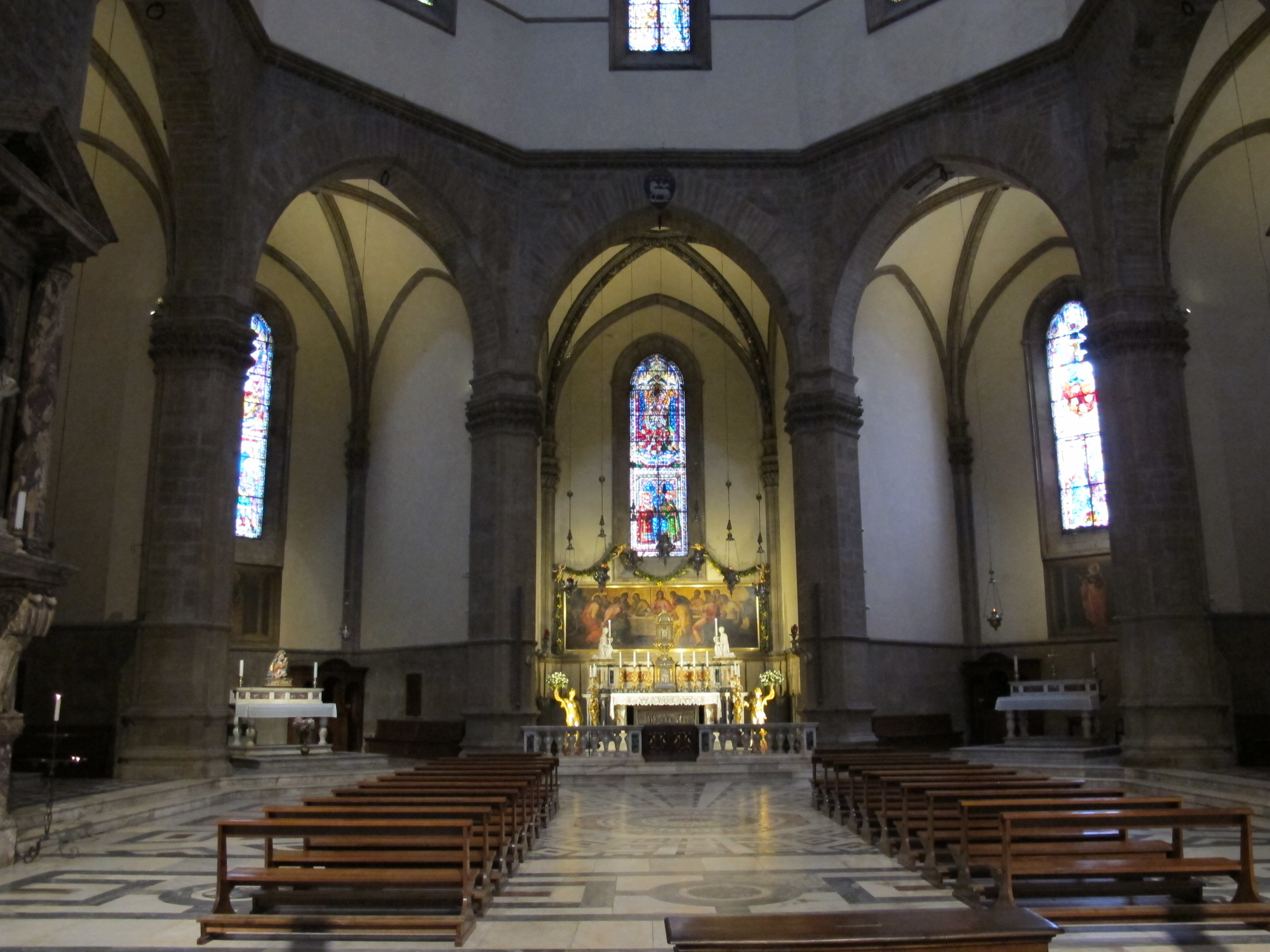 Santa maria del fiore, tribuna di san zanobi